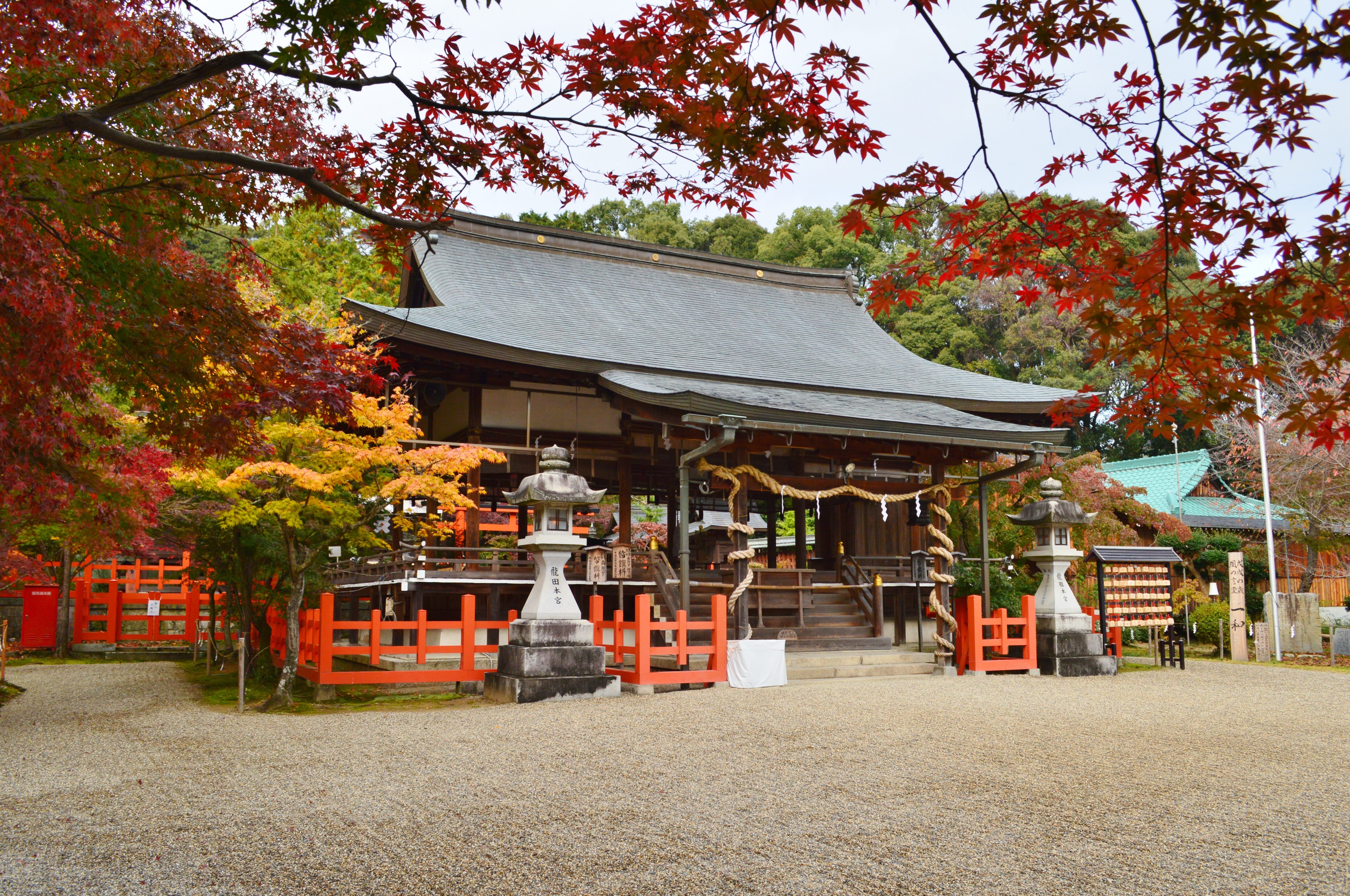 龍田大社 拝殿